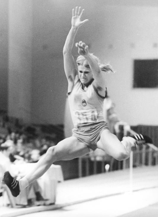 Burglinde Pollak ADN-ZB Mittelstädt 20.2.72 Senftenberg: DDR-Hallenmeisterschaften im Fünfkampf. In Abwesenheit der DDR-Freiluftmeisterin Margit Ölfert-Herbst gewann erwartungsgemäß Burglinde Pollak (ASK Vorwärts Potsdam - Foto von einem früheren Hallenwettkampf) den DDR-Fünfkampftitel der Frauen mit 4490 Punkten. Ihre Einzelleistungen: 6,12 Weitsprung, 14,92 m Kugelstoßen, 1,66 m Hochsprung, 13,8 s 100 m Hürden und 24,6 s 200 m (am 19.2.72)